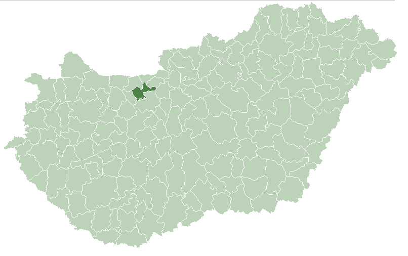 Poloha okresu v rámci Maďarska.